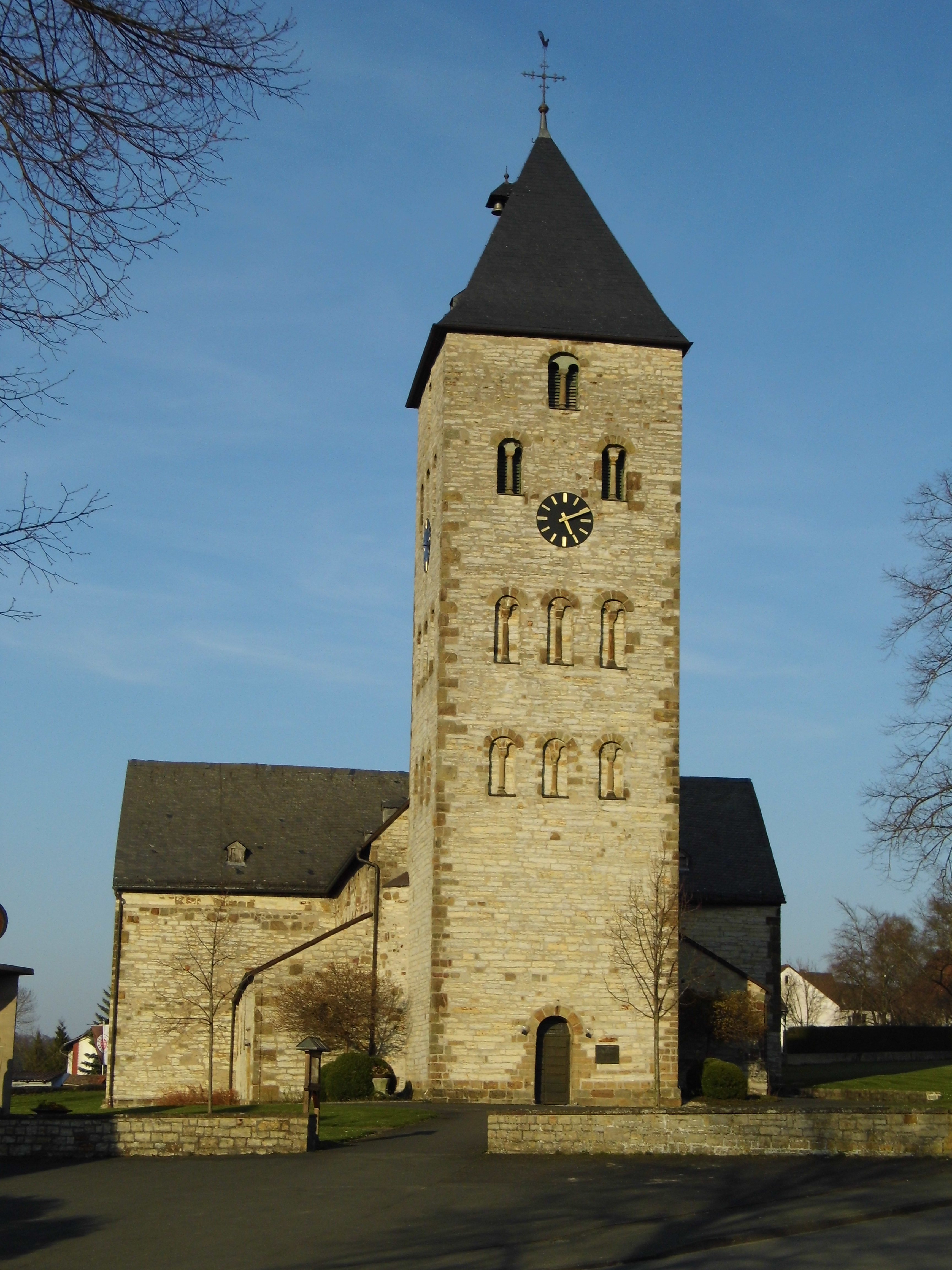 Westturm der katholischen Kirche St. Kilian (Brenken)